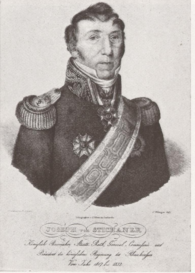 Joseph von Stichaner, langjähriger Regierungspräsident der Pfalz